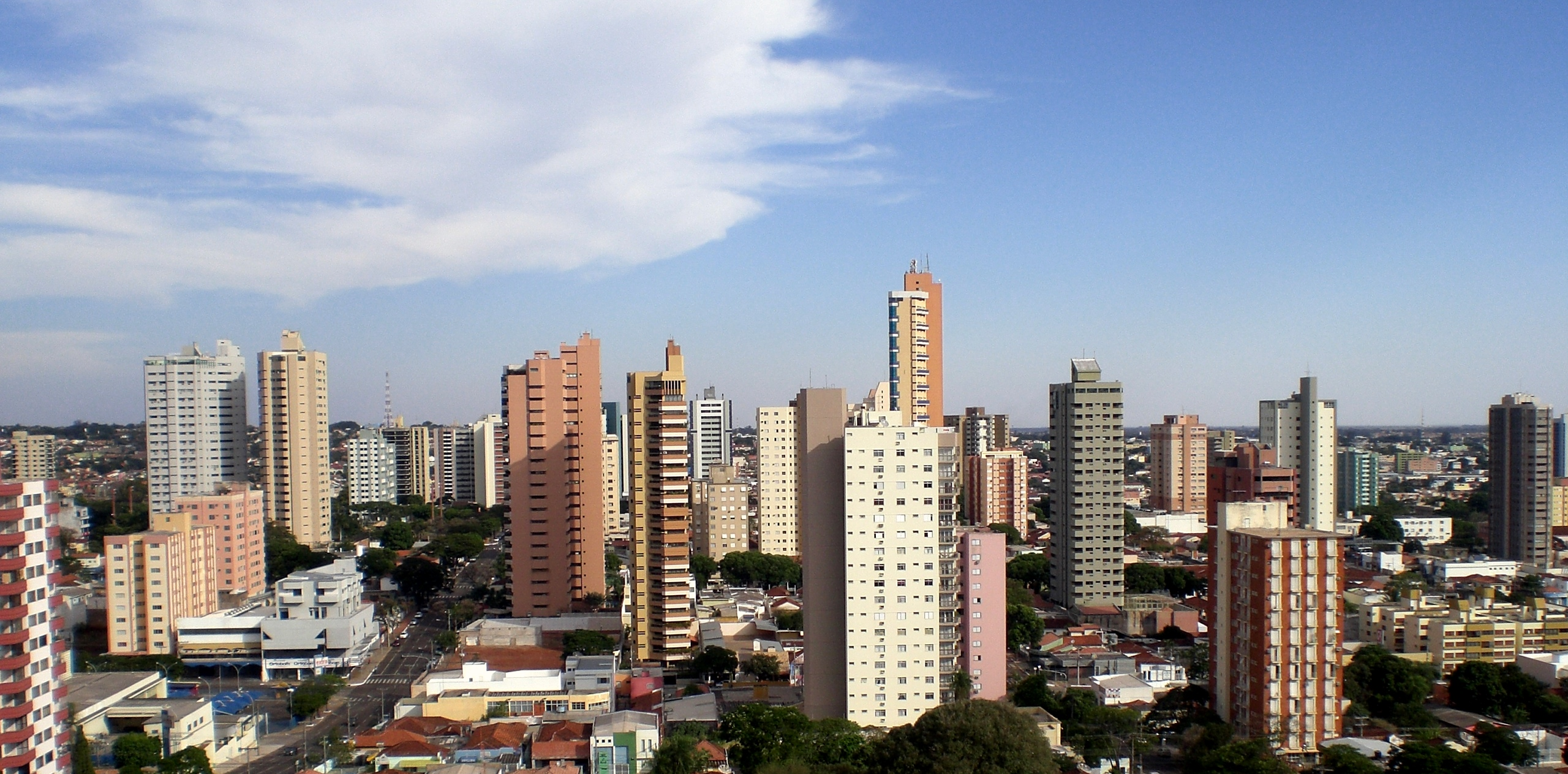 Vista Panoramica.